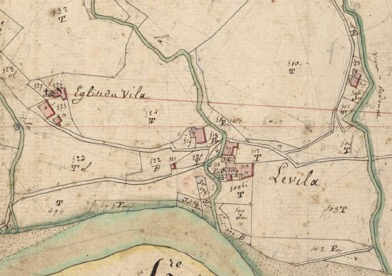 El Vilar de Reiners en el Cadastre napoleònic del 1812 (Arxius Departamentals dels Pirineus Orientals)